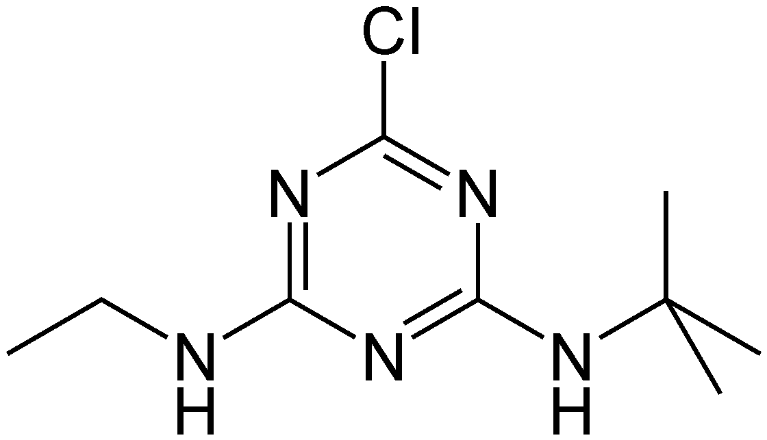 Terbuthylazin